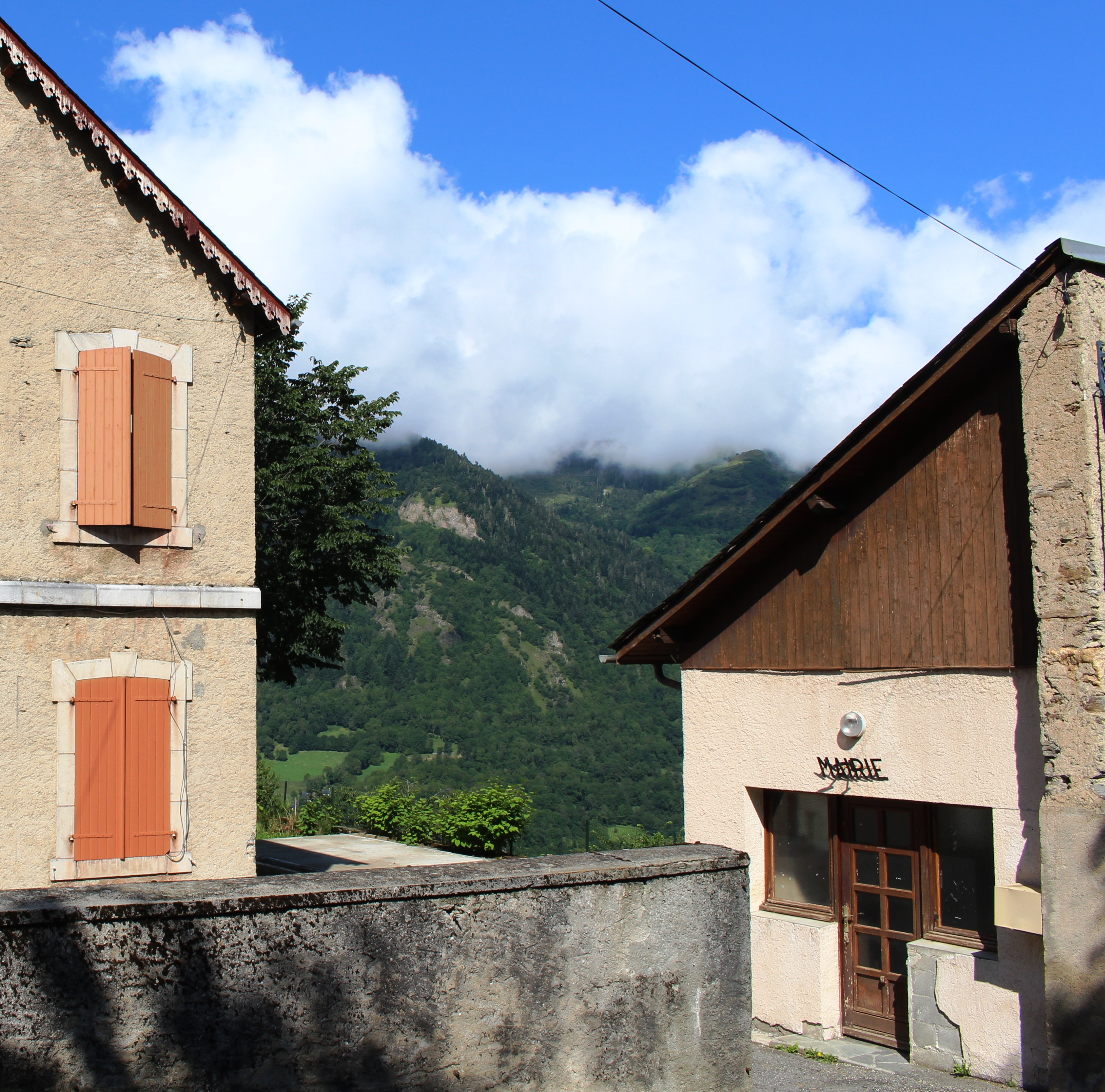 Mairie de Loudervielle (Hautes-Pyrénées)